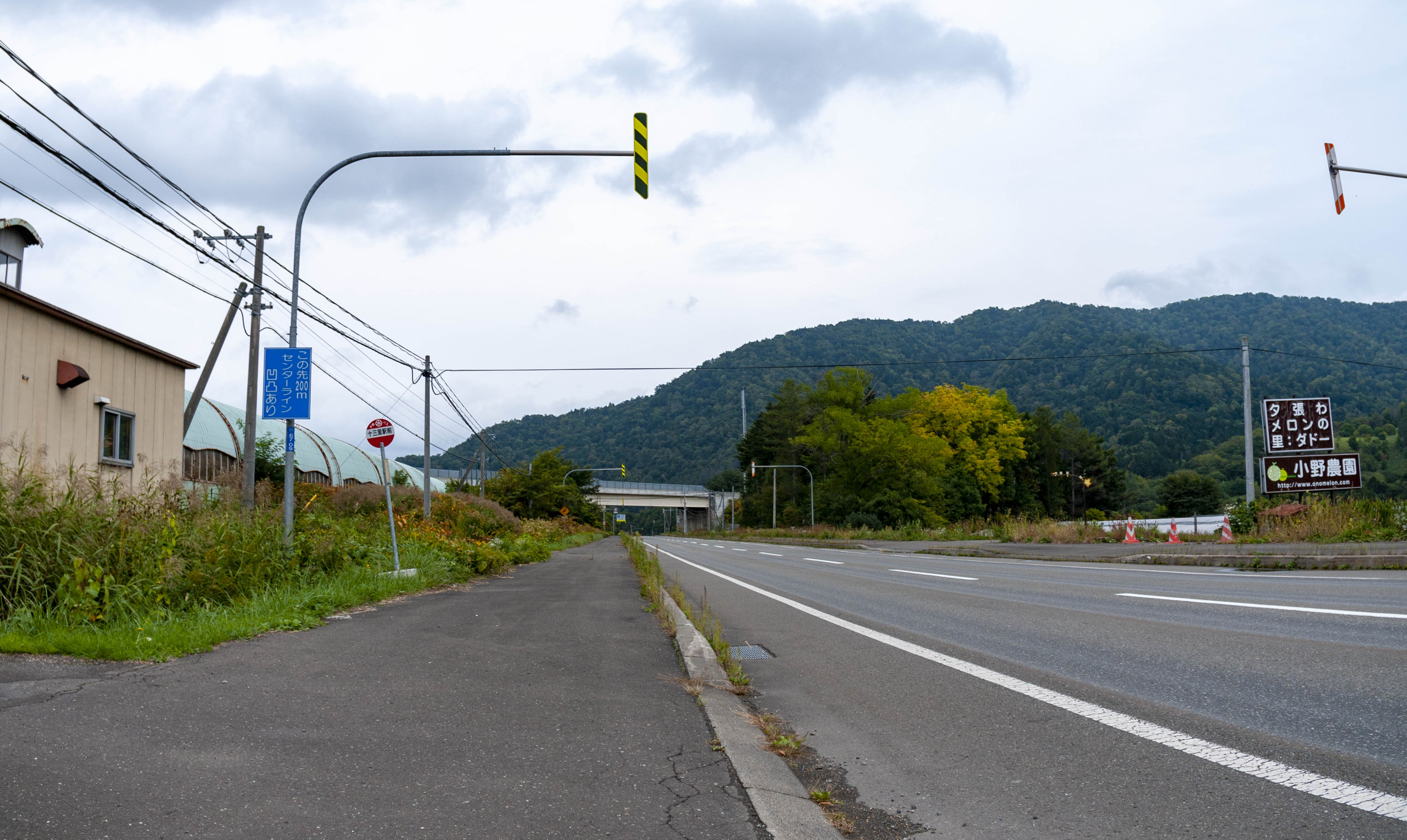 北海道旅客鉄道石勝線十三里駅（現十三里信号場）駅前